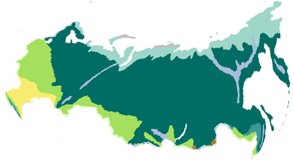 Végétation de la Russie reformatée